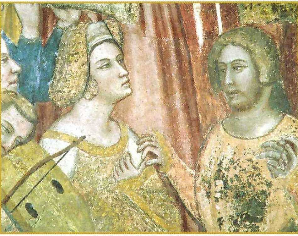 Napoli, chiesa di Santa Maria Incoronata - Affresco di Roberto d'Oderisio raffigurante il matrimonio della regina Giovanna I d'Angiò con Luigi di Taranto.